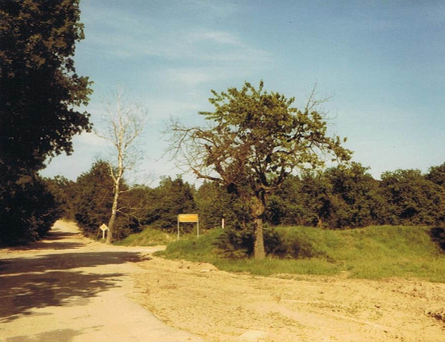 Wüstung Mackenthun